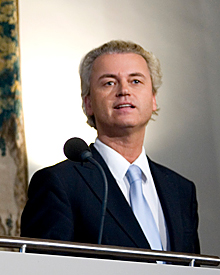 Fractievoorzitters Mark Rutte (VVD) en Maxime Verhagen (CDA) luisteren bij de presentatie van het regeer- en gedoogakkoord aandachtig naar PVV-fractievoorzitter Geert Wilders